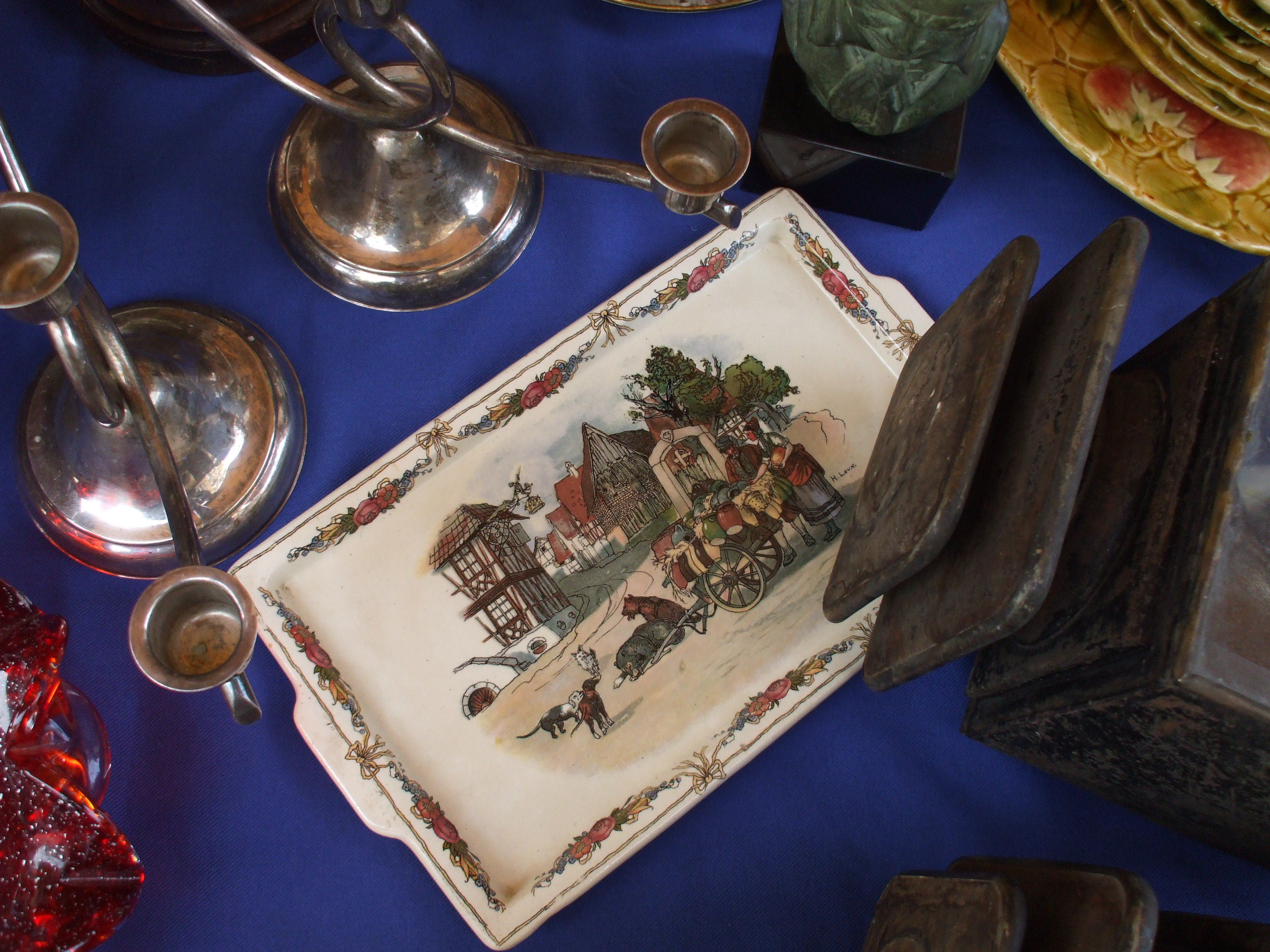 Henri Loux, la carriole du colporteur trainée par des chiens Faience de Sarreguemines, modèle Obernai, plat à gâteau, XIXe siècle.